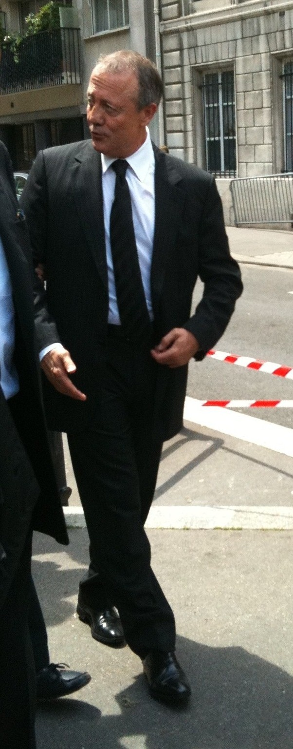 Berbard Lacombe en 2012.